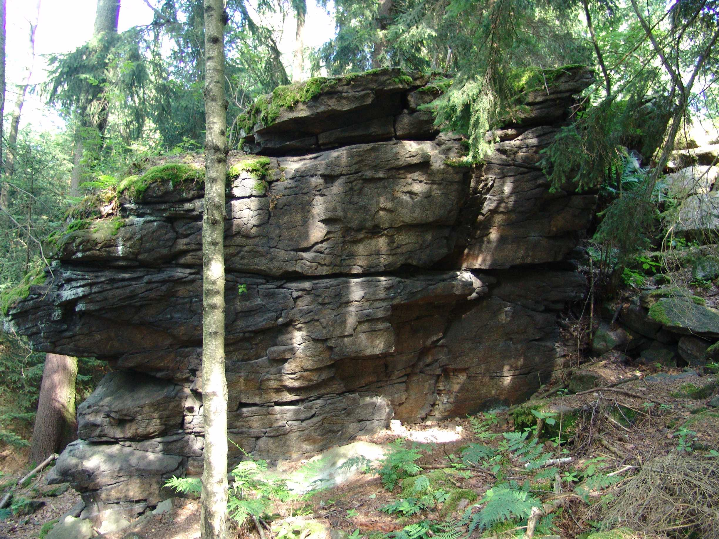 Steinklunsen in Beiersdorf